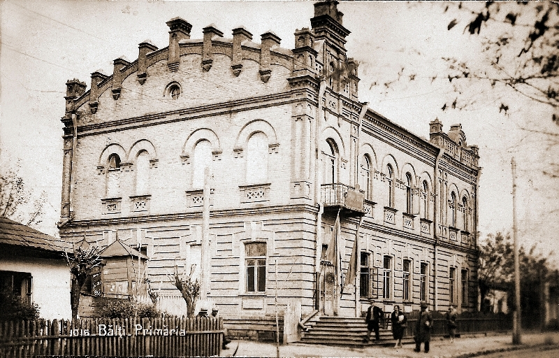 Primăria municipiului Bălţi în perioada interbelică